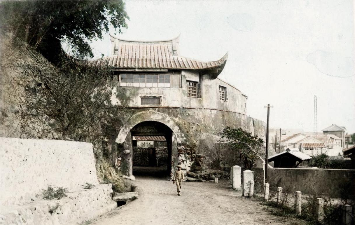 澎湖媽宮城。